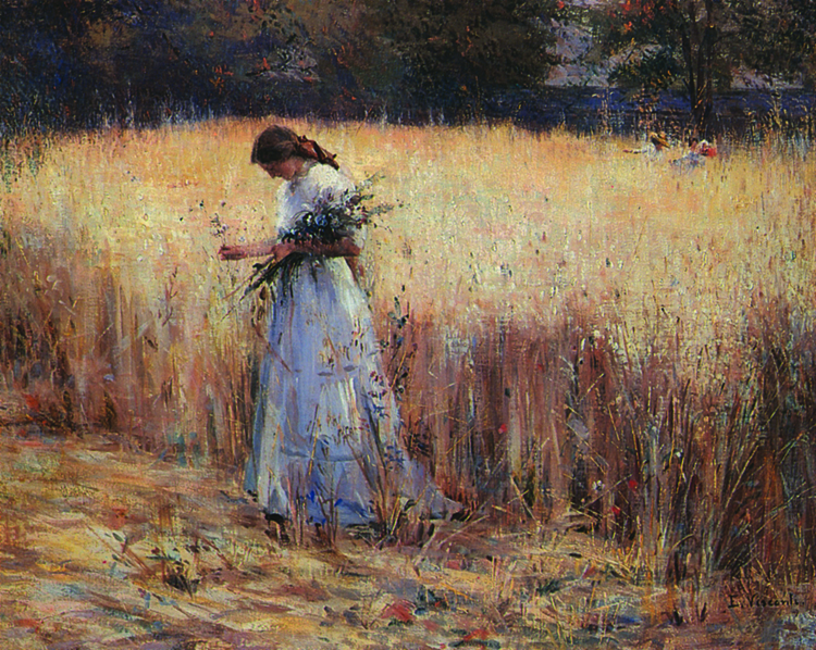 Eliseu Visconti - MOÇA NO TRIGAL -OST-65x80-c.1916-COLEÇÃO PARTICULAR